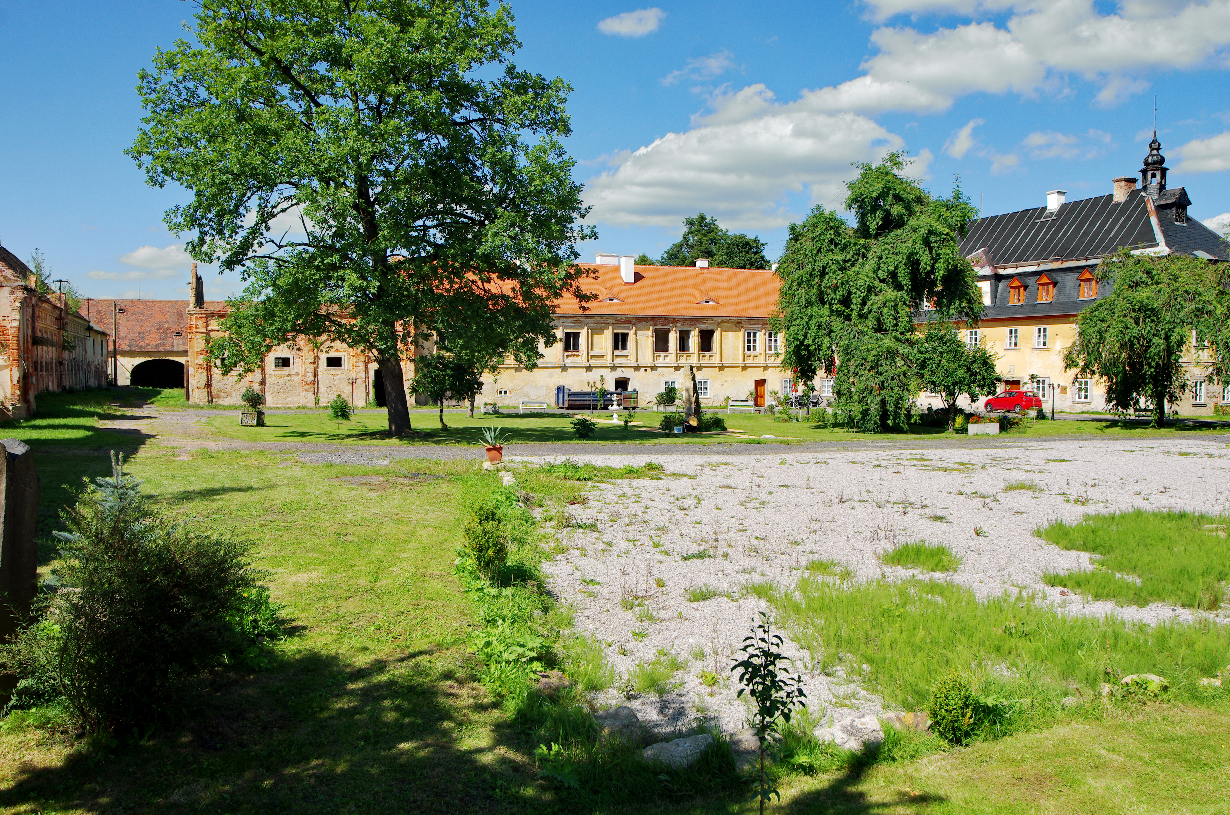 Nový Kostel, statek Nový dvůr (Spálená - ZSJ obce Nový Kostel), okres Cheb